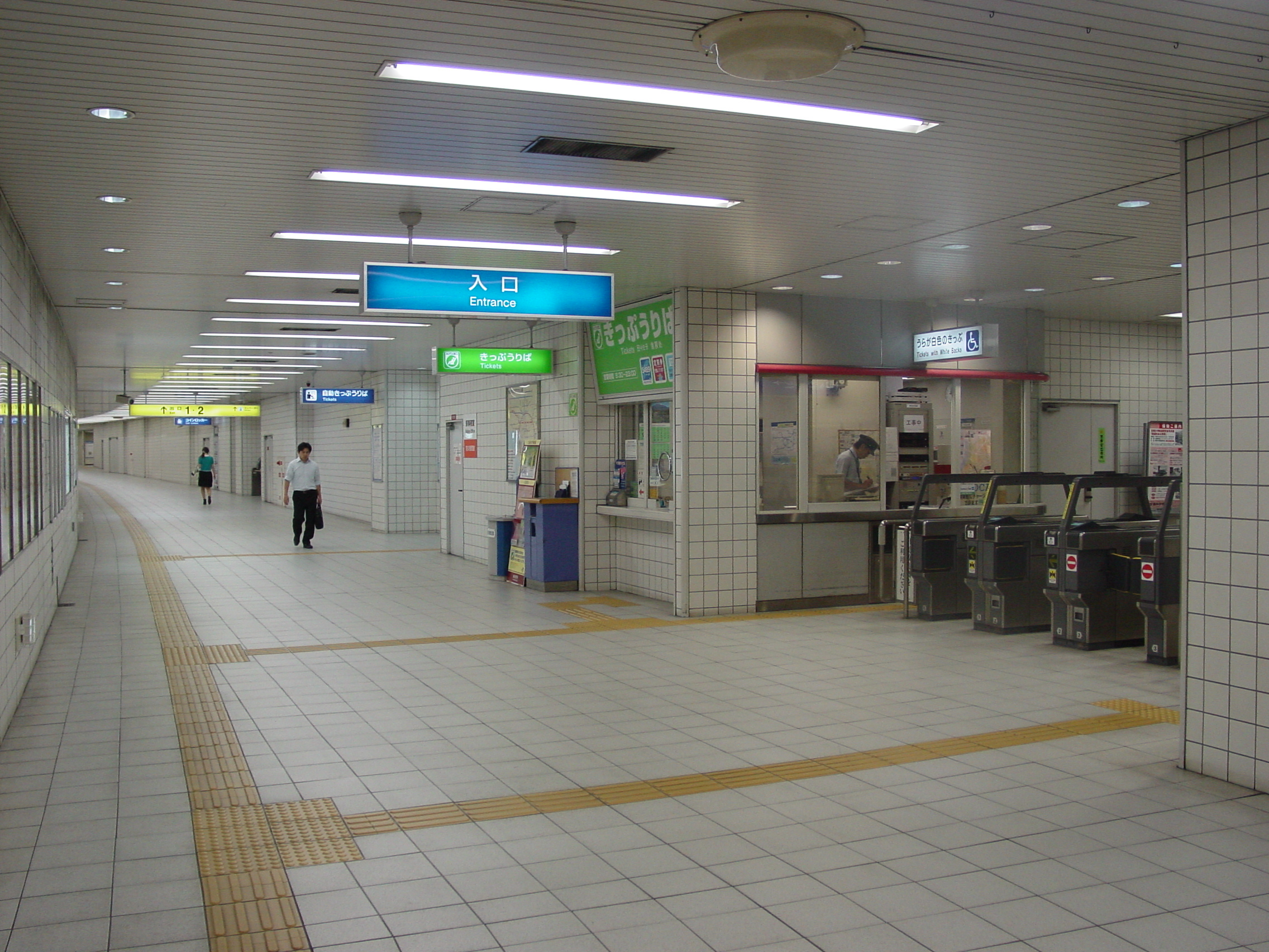 大阪城北詰駅コンコース